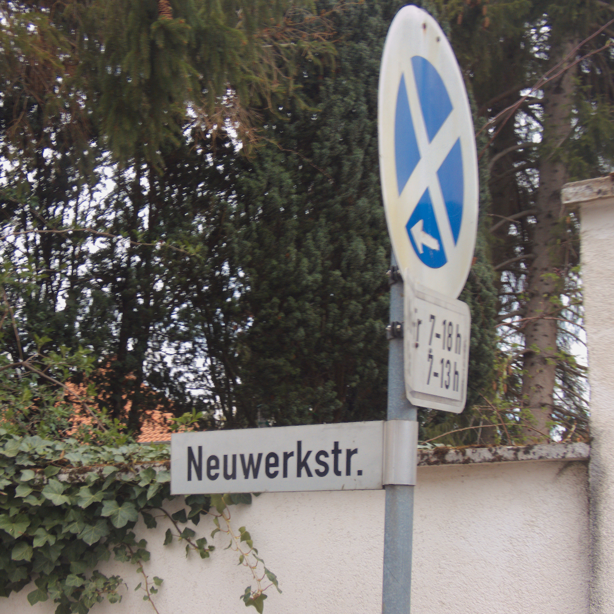 Straßenschild in Gehrden, Region Hannover